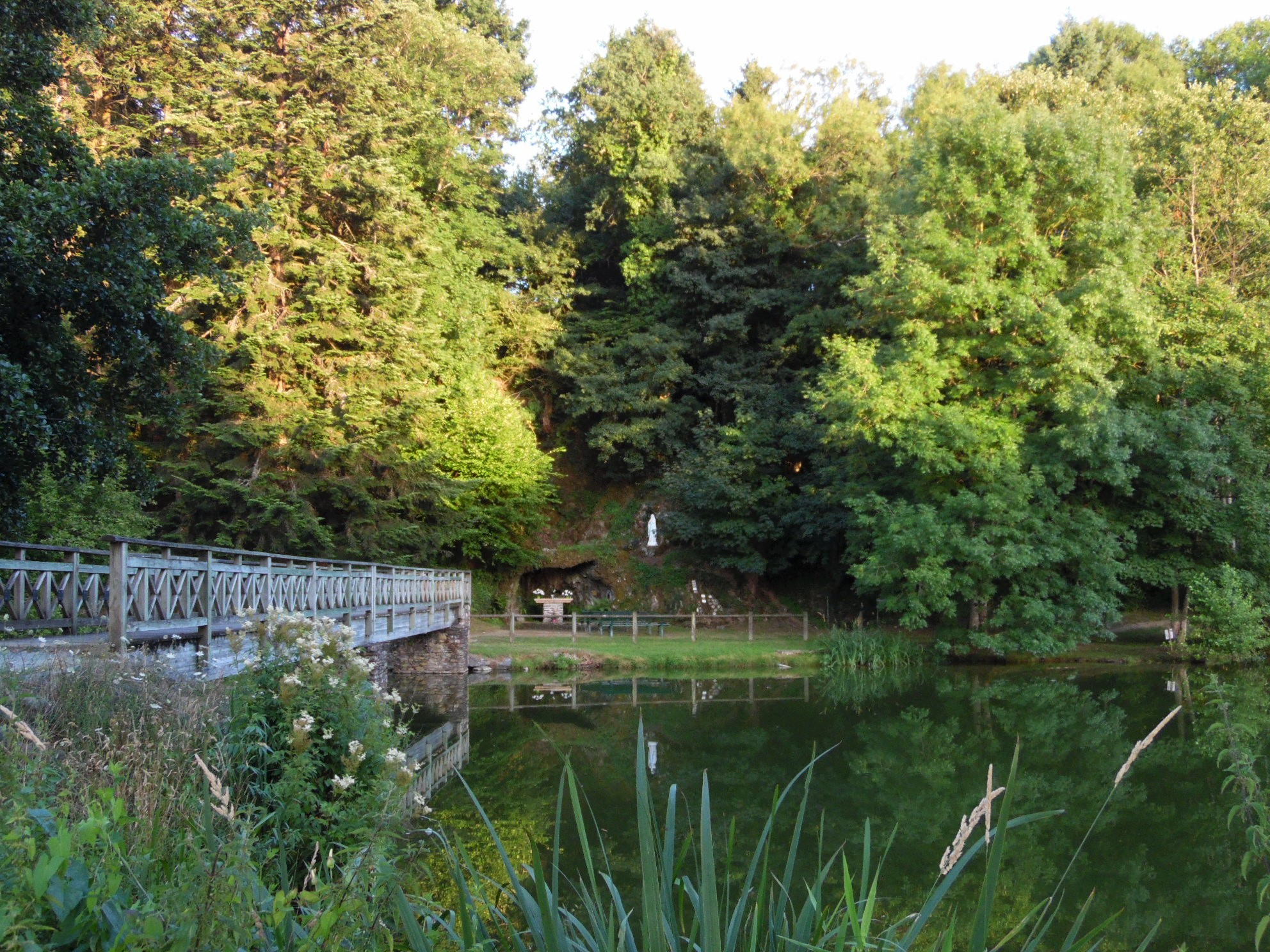 La reproduction de la grotte de Lourdes, à Vouvant.